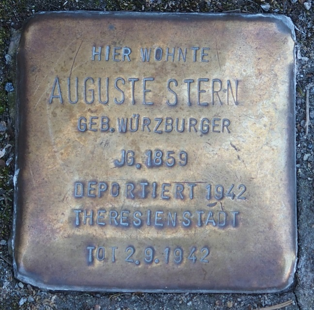 Stolperstein in Soest Niedergasse 2, Auguste Stern